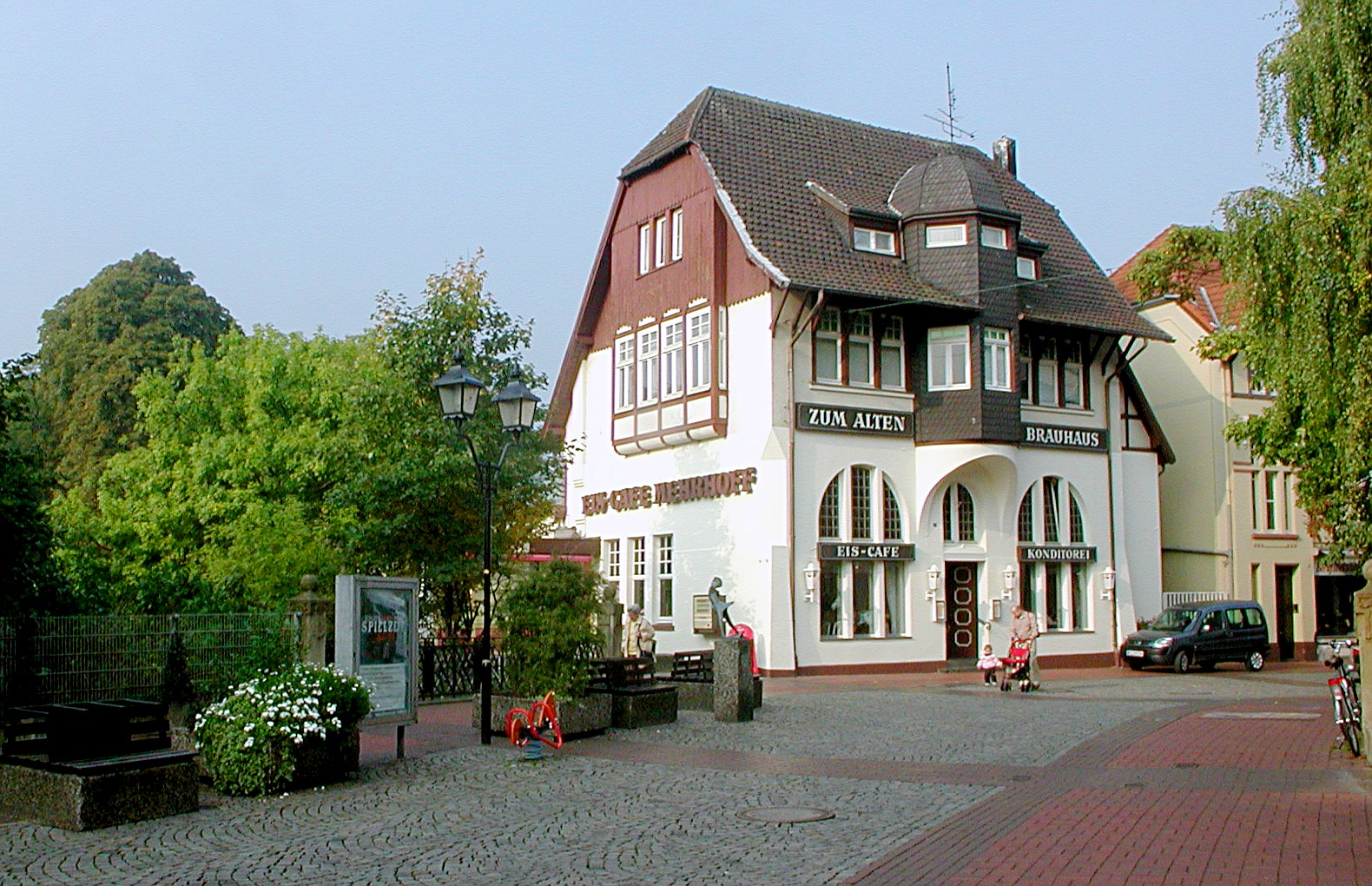 Das alte Brauhaus ist ein historisches Gebäude in der Innenstadt von Moers und beherbergt zur Zeit ein Cafe und einen Biergarten.